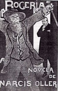 Litografia de Mariano Foix per a l'anunci de la novel·la publicat al setmanari "L'Esquella de la Torratxa (14.06.1900).